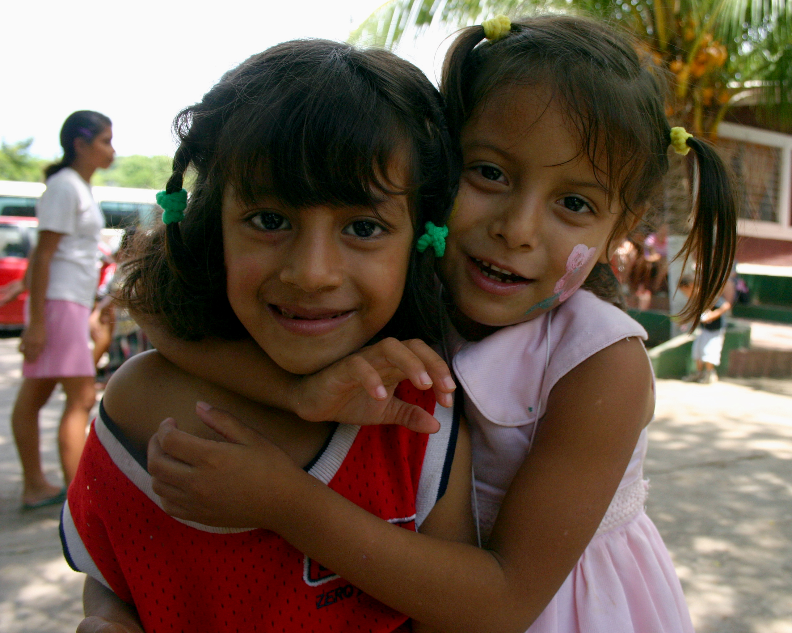 Two girls smile for the camera in an orphanage near La Libertad, El Salvador. Dos niñas sonríen para la cámera fotográfica en un orfanato cerca de La Libertad, El Salvador.